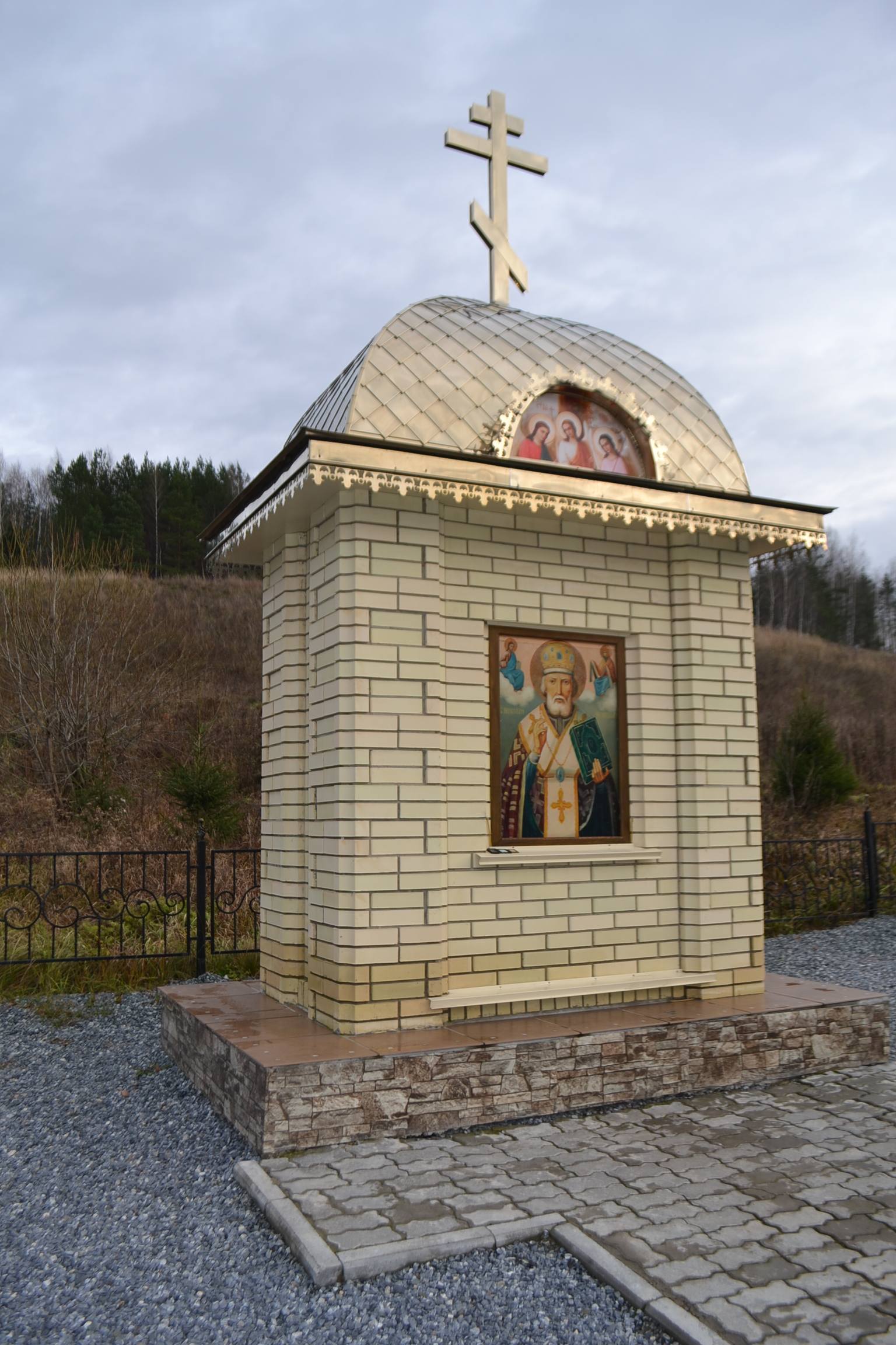 Среднее Девятово. Часовня Николая чудотворца